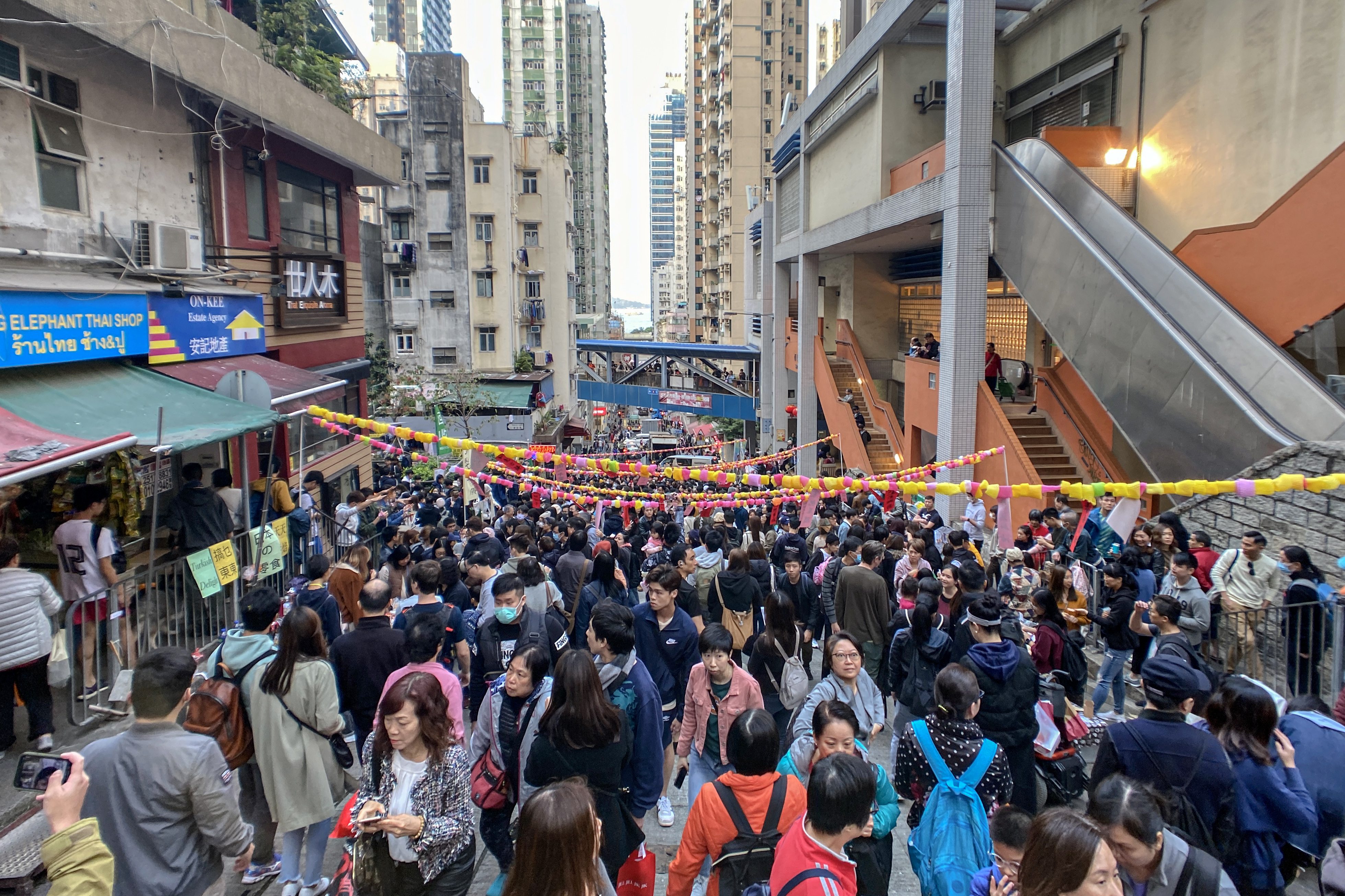 西營盤山城和你宵